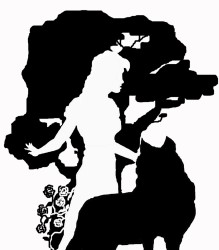 Scherenschnitt: Dave Biesemann Quelle: Dietmar Fennel